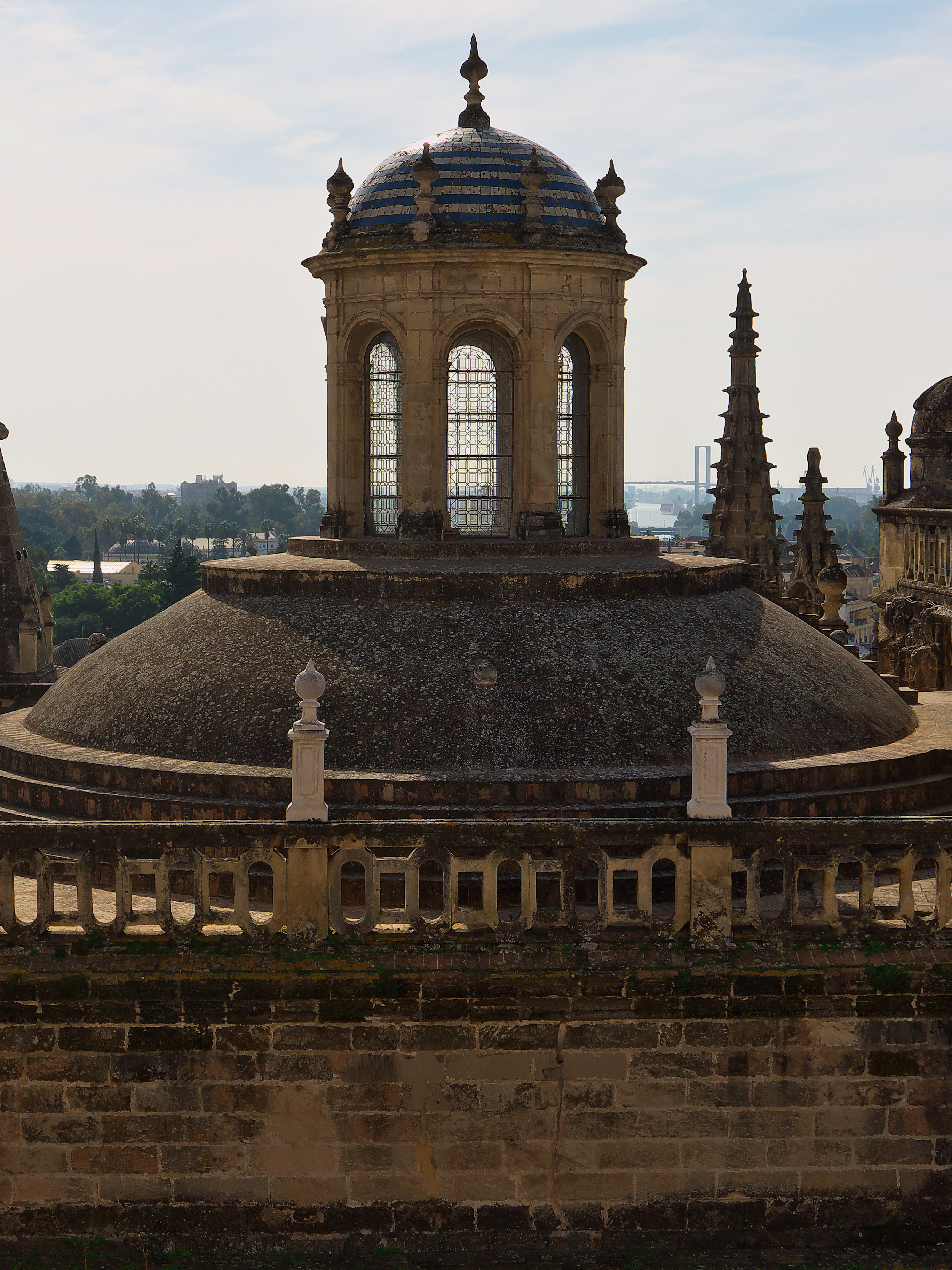 Sebastián Van der Borcht reconstruyó (1754-1756) la linterna de la Capilla Real de Sevilla.